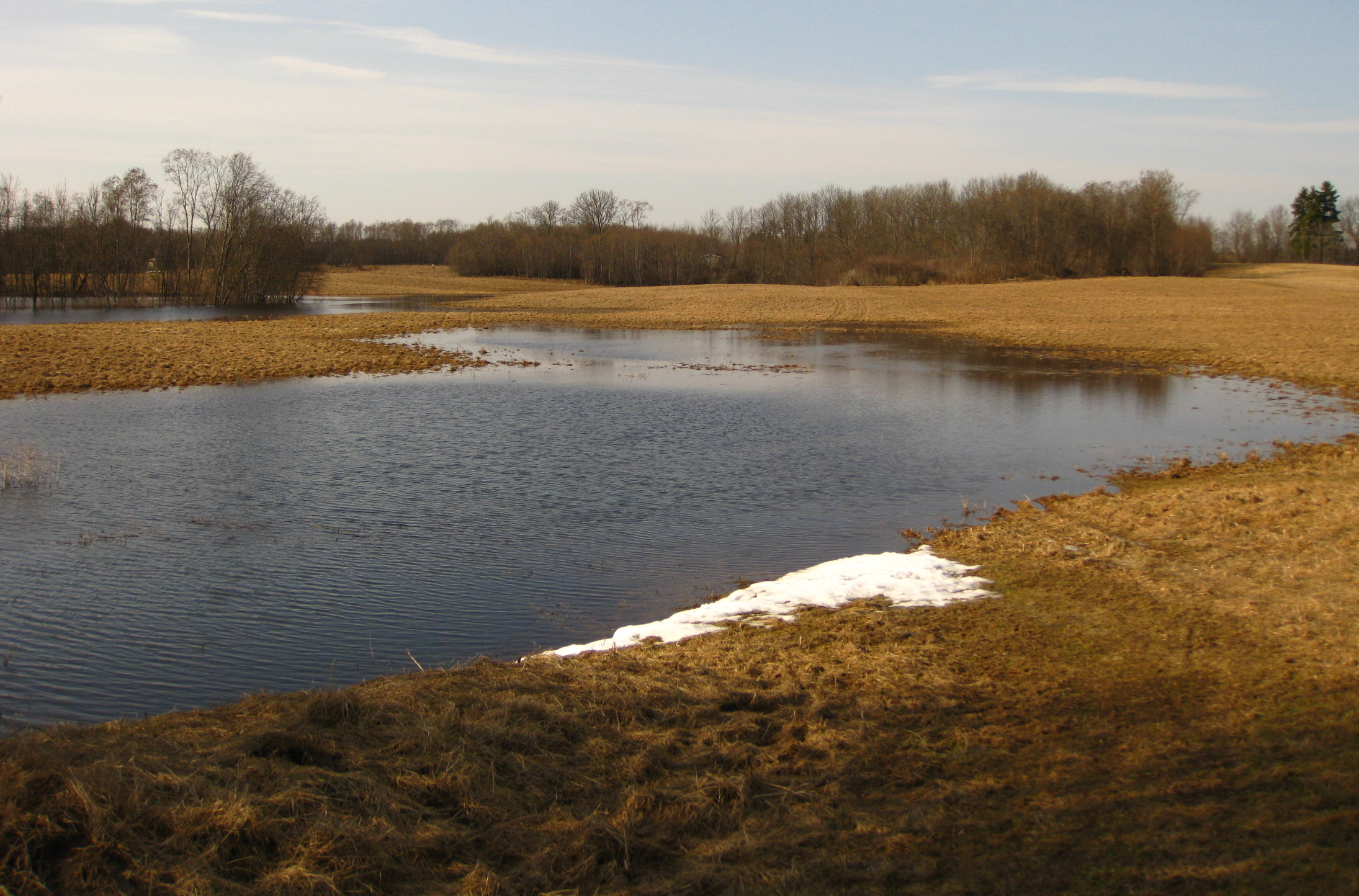 Ajutine karstjärvik Tuhala maastikukaitsealal